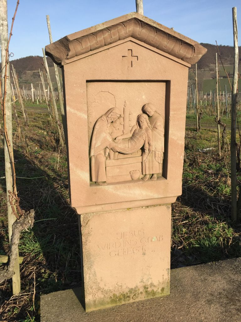 Kreuzweg Trittenheim - Station 14 von 14